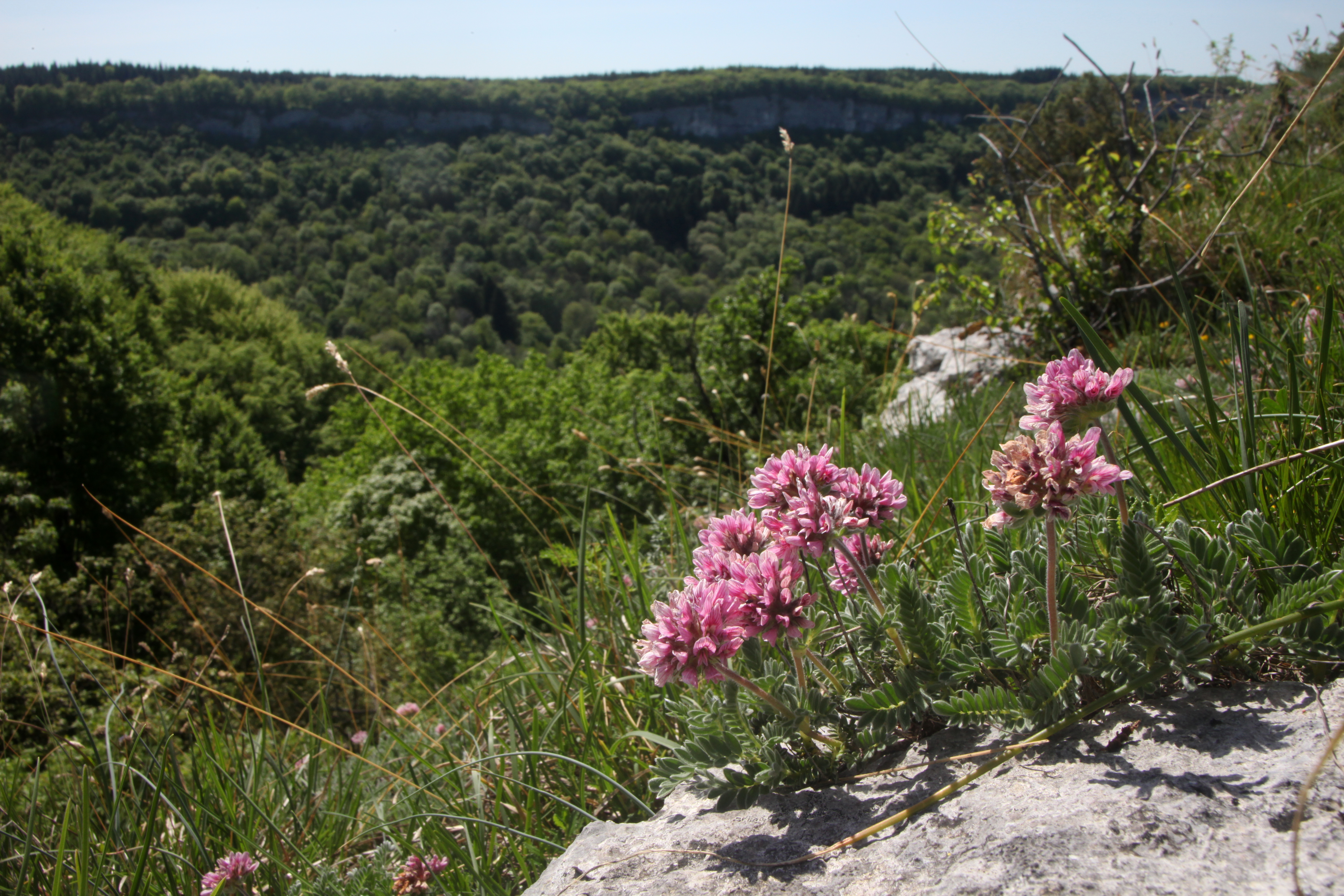 L'anthyllide des montagnes fleurit en mai et colore en rose les corniches calcaires du ravin de Valbois.